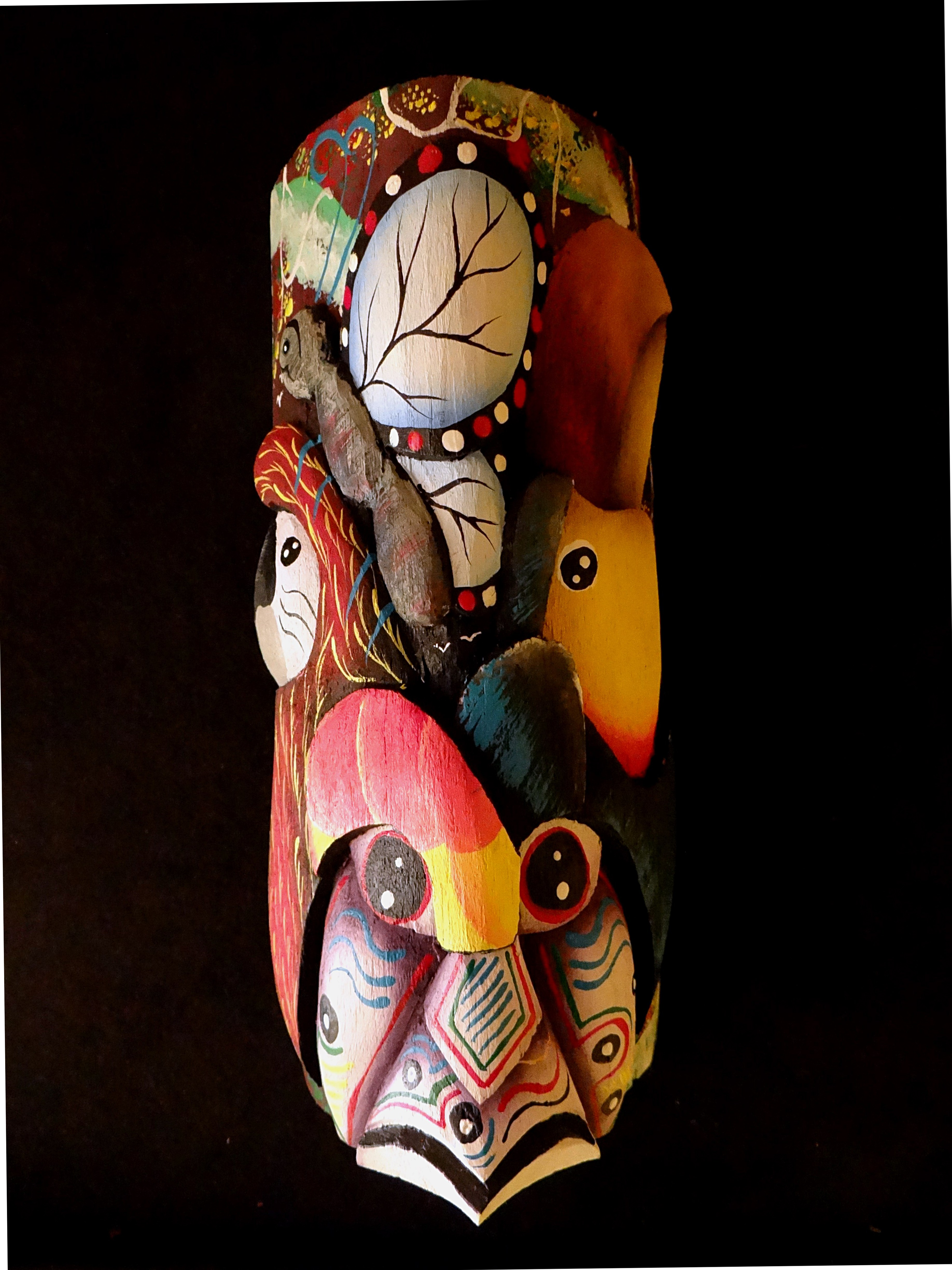 Sculpture peinte sur Balsa, artisanat Maleku, Palenque Tonjibe (village), région de Guatuso, Costa Rica.